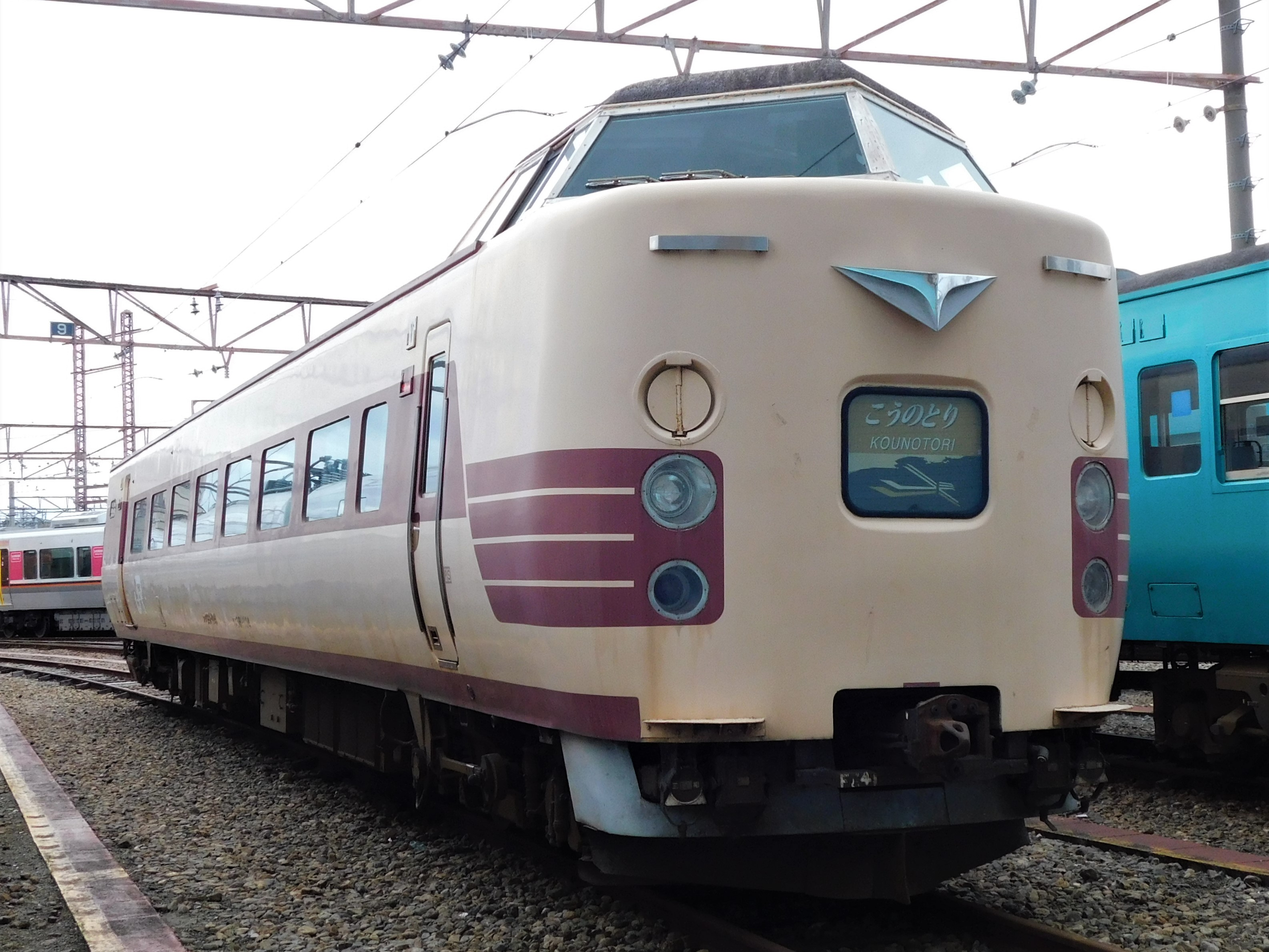 吹田総合車両所一般公開(2019・R1)